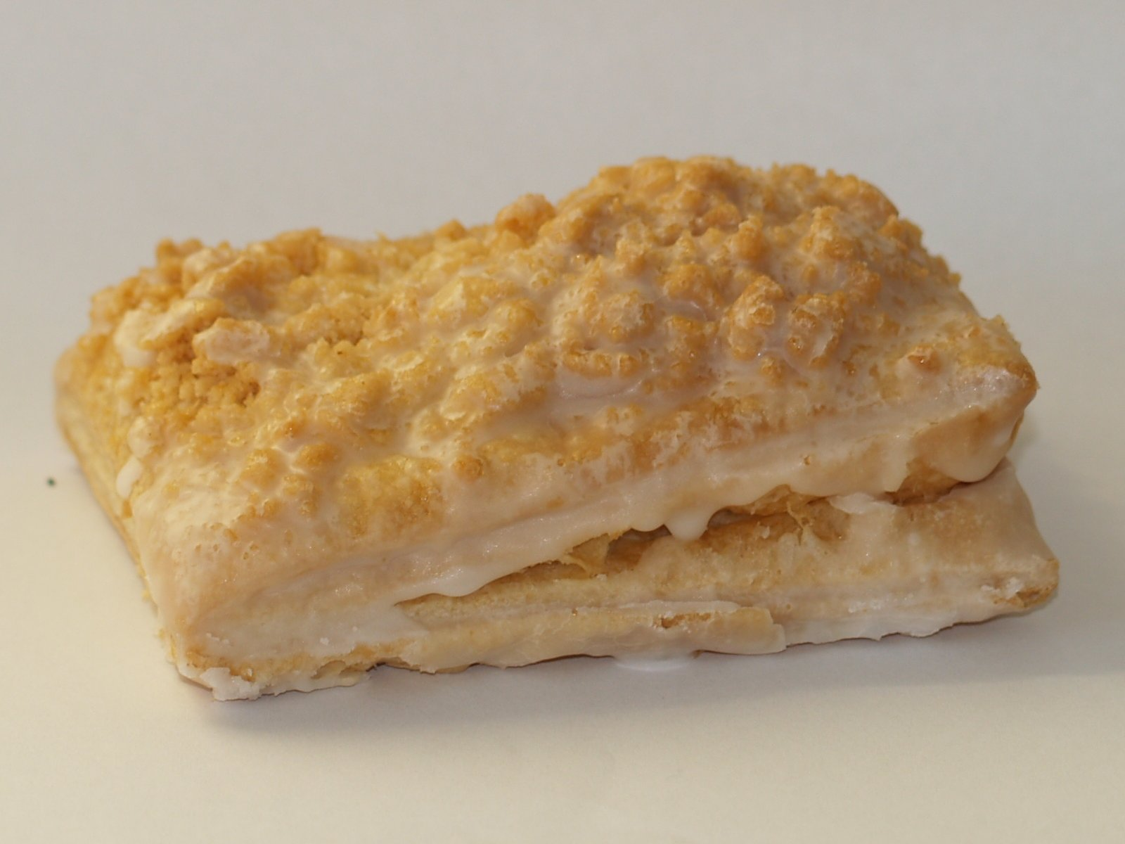 Prasselkuchen